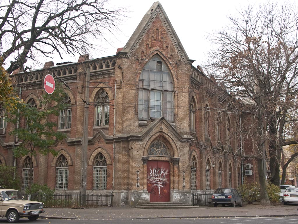 Украина (Україна): обл.Одесская (обл.Одеська): Одесса (Одеса): р-н Приморский: бул.Итальянский,7; 10:28 04.11.2008